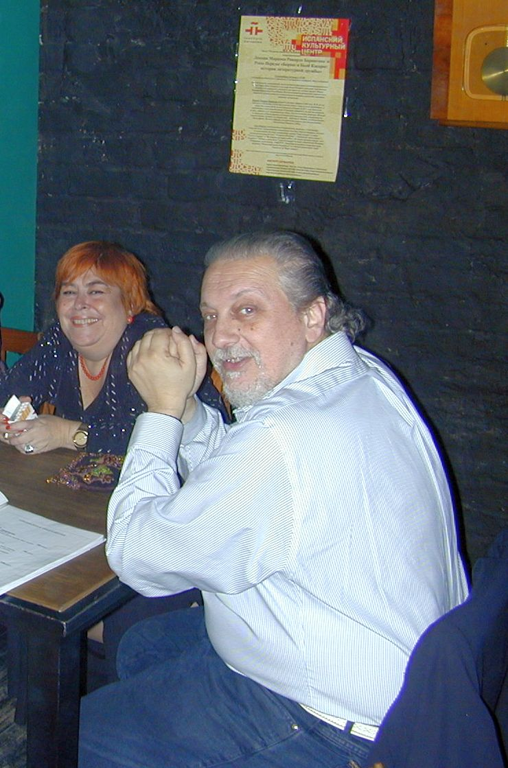 Маркос Рикардо Барнатан с женой Росой Передой в Москве